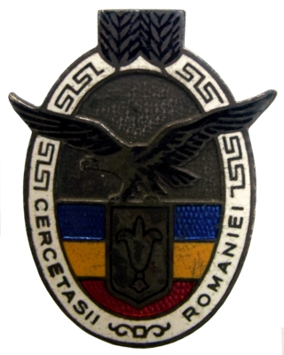 insigna Cercetasii Romaniei